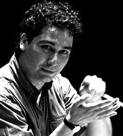 Director de orquesta colombiano